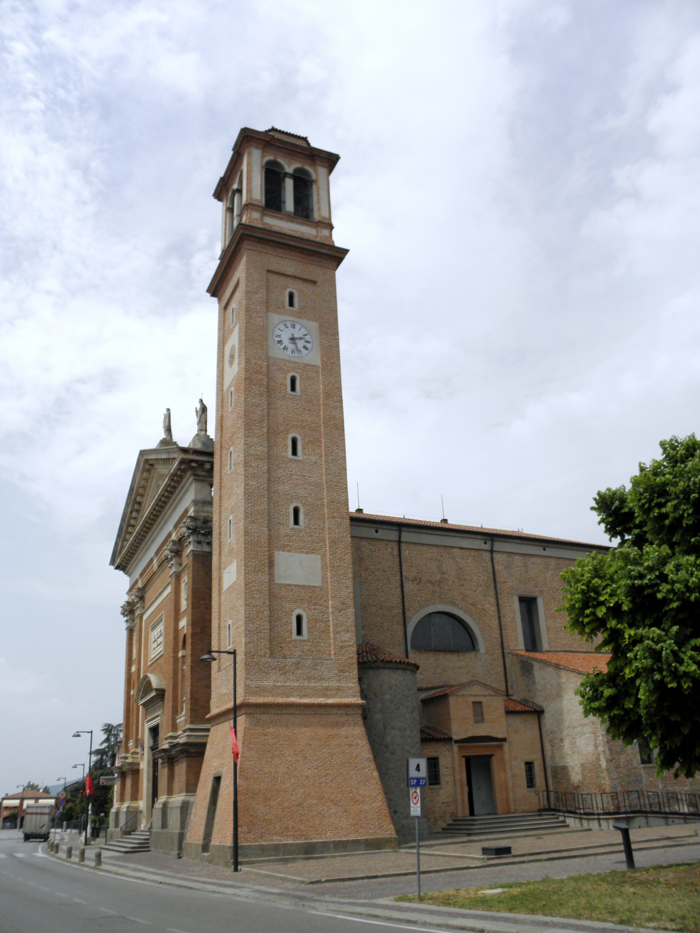 Pozzonovo, Chiesa Parrocchiale della Natività della Beata Vergine Maria: il campanile.